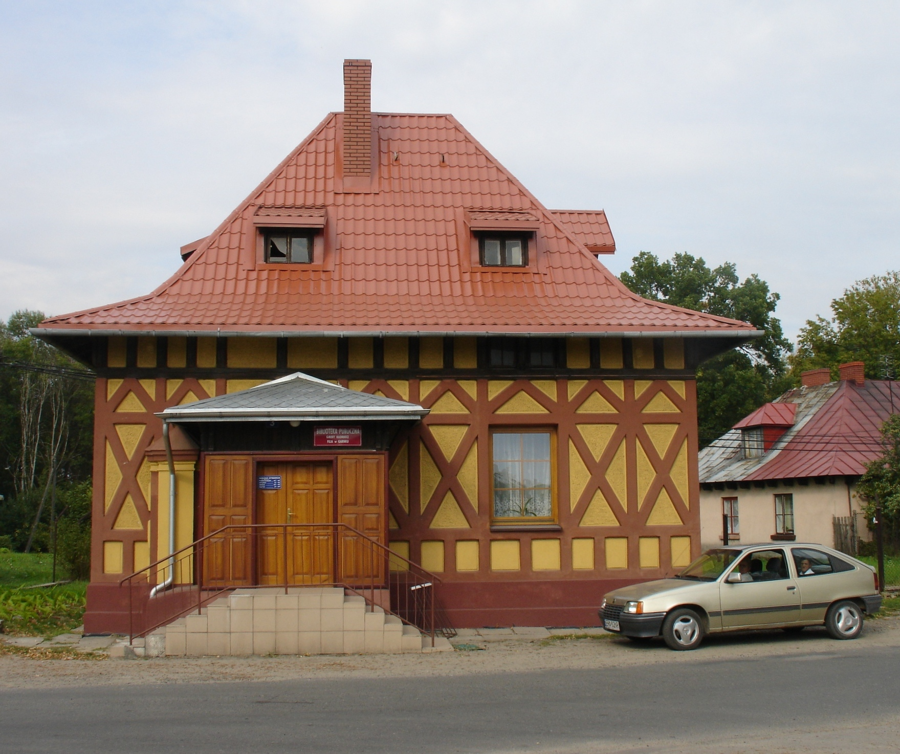 Zabytkowy budynek Gminnej Biblioteki Publicznej w Garnku, dawna stróżówka przy pałacu Edwarda Reszke